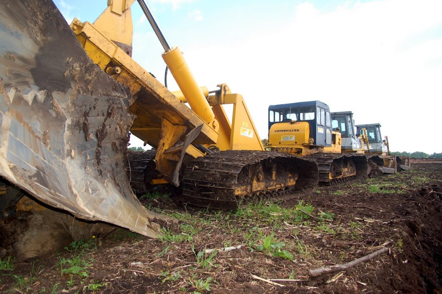 Tiefpflug in Ekern/Bad Zwischenahn